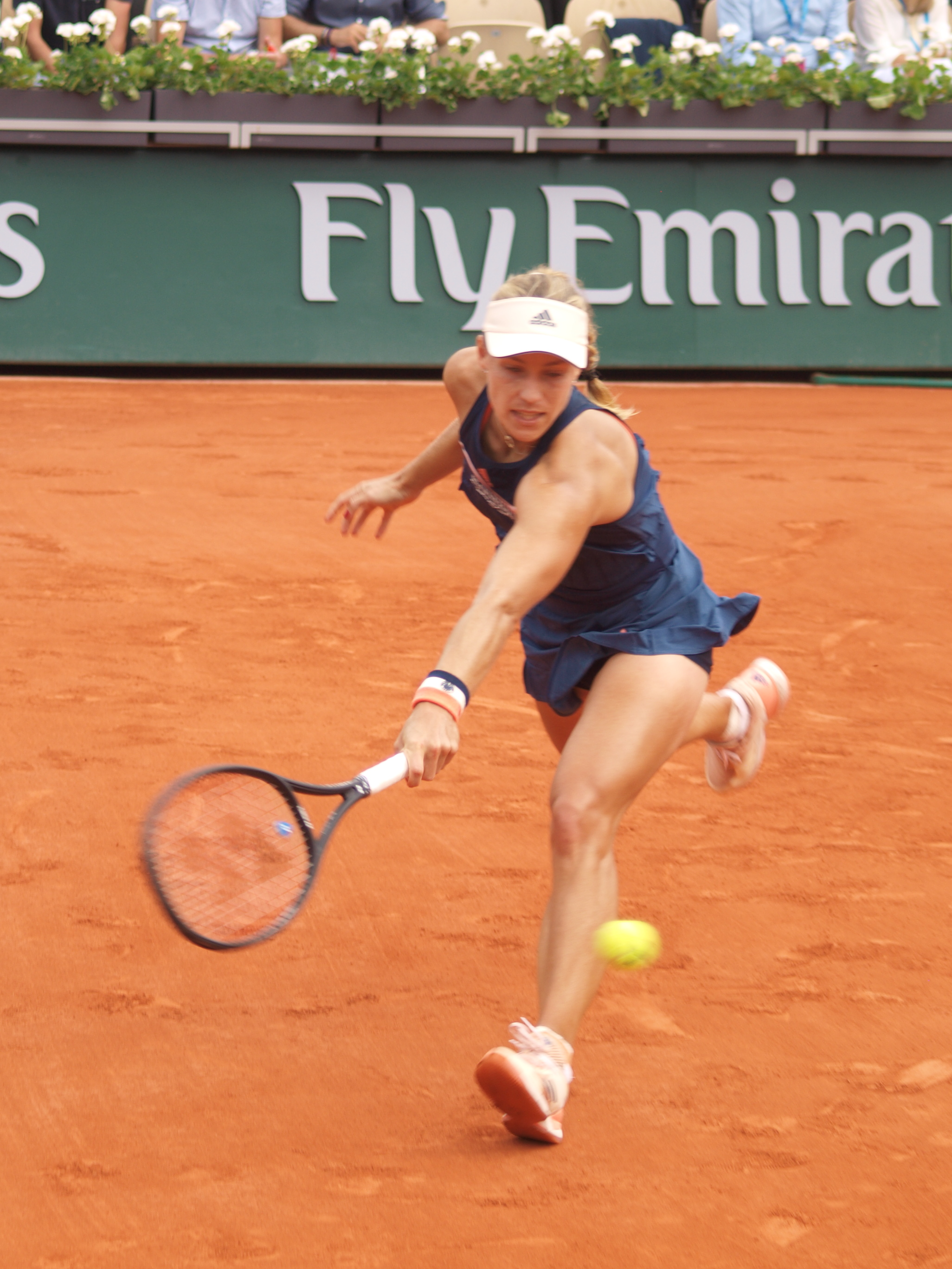 Angelique Kerber lors de son match contre Caroline Garcia, sur le cours Suzanne Lenglen (stade Roland Garros à Paris), le 4 juin 2018